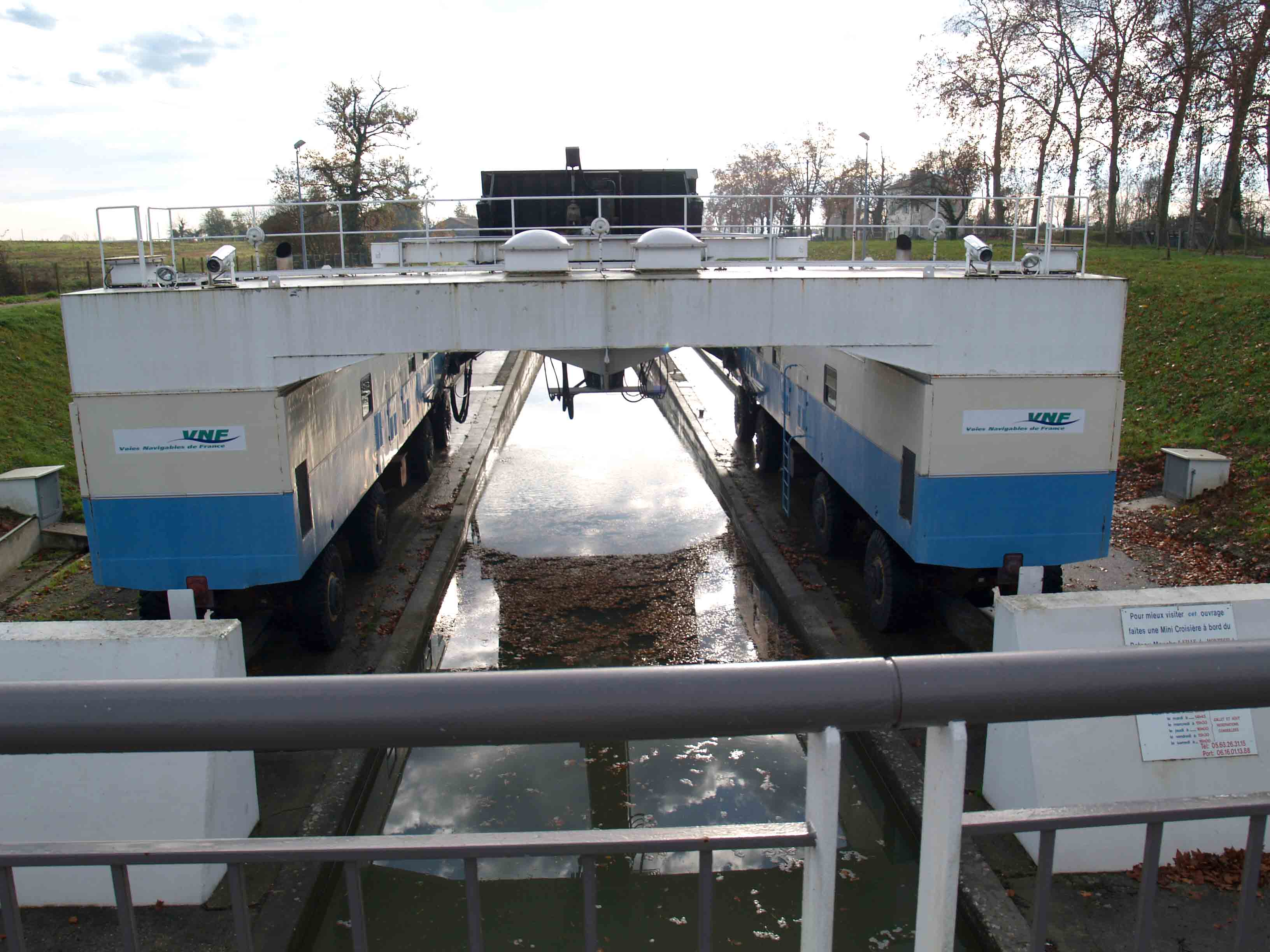 Pente d'eau de Montech Photo personelle Bertrand Bouret Montech Montech